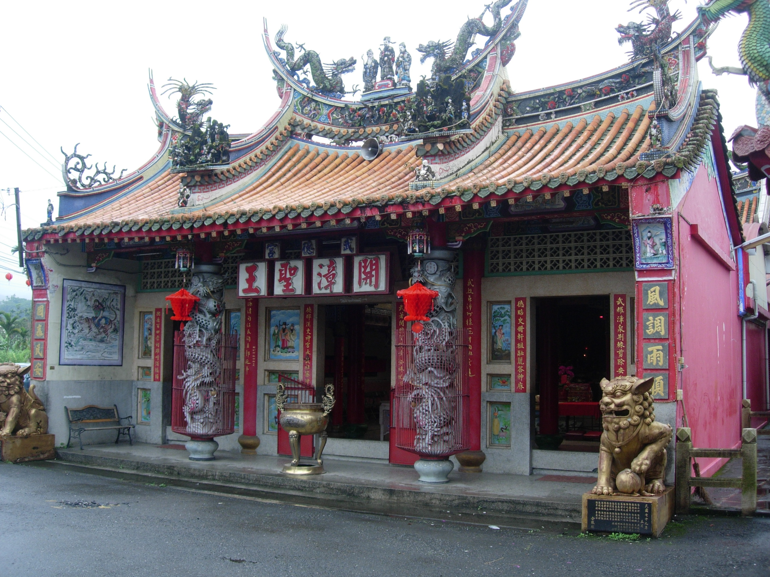 中文（台灣）: 竹山社寮武德宮